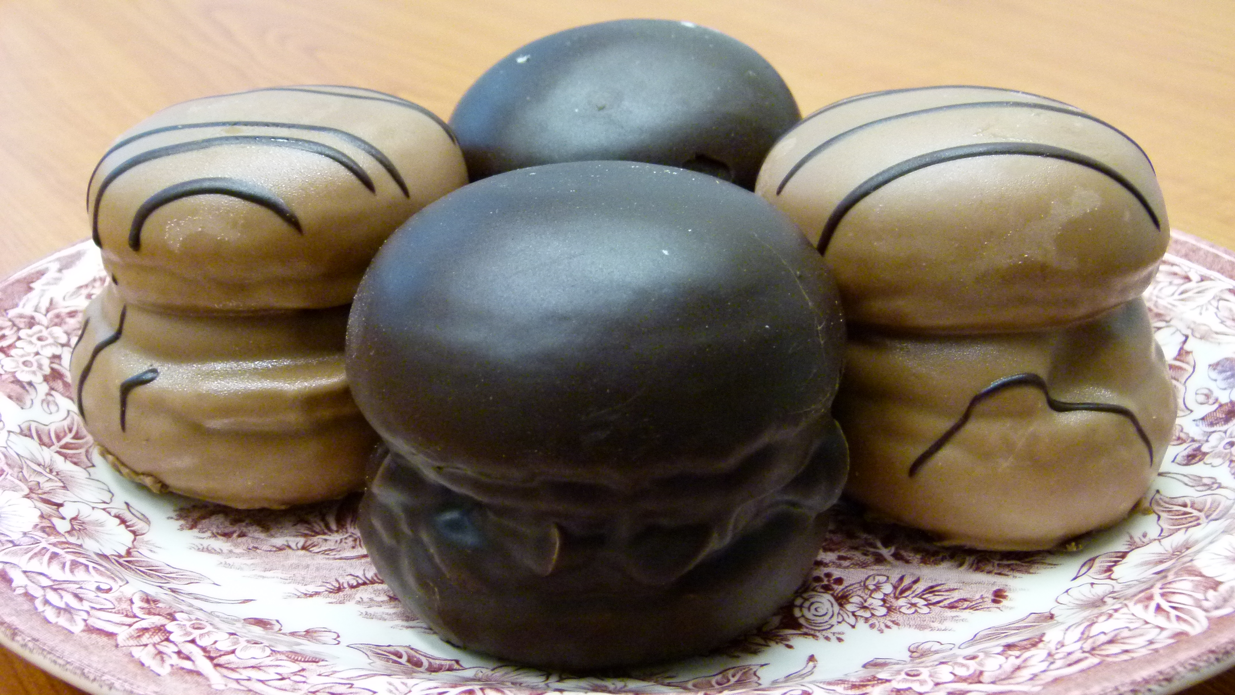 Mohrenkopf - Gebäck mit Füllung (Vanillepudding bzw. Nougatcreme), Bäcker Möbius, Dresden